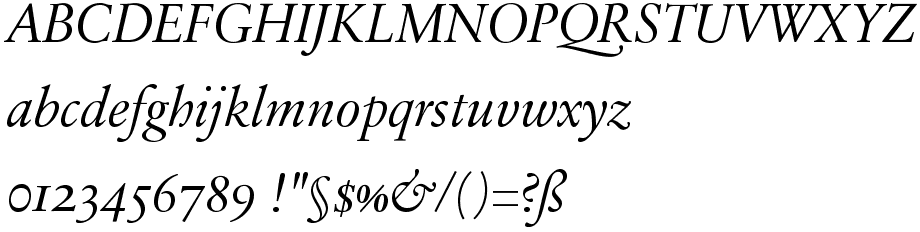 schriftartenmuster der sabon next italic